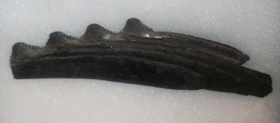 Fossil of Edestus, an extinct shark- Took the photo at Fossil Show, Munchen 2011